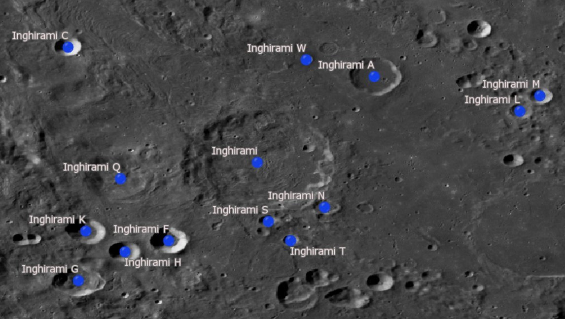 Cráter lunar Inghirami. Cráteres satélite. (Imagen LRO)